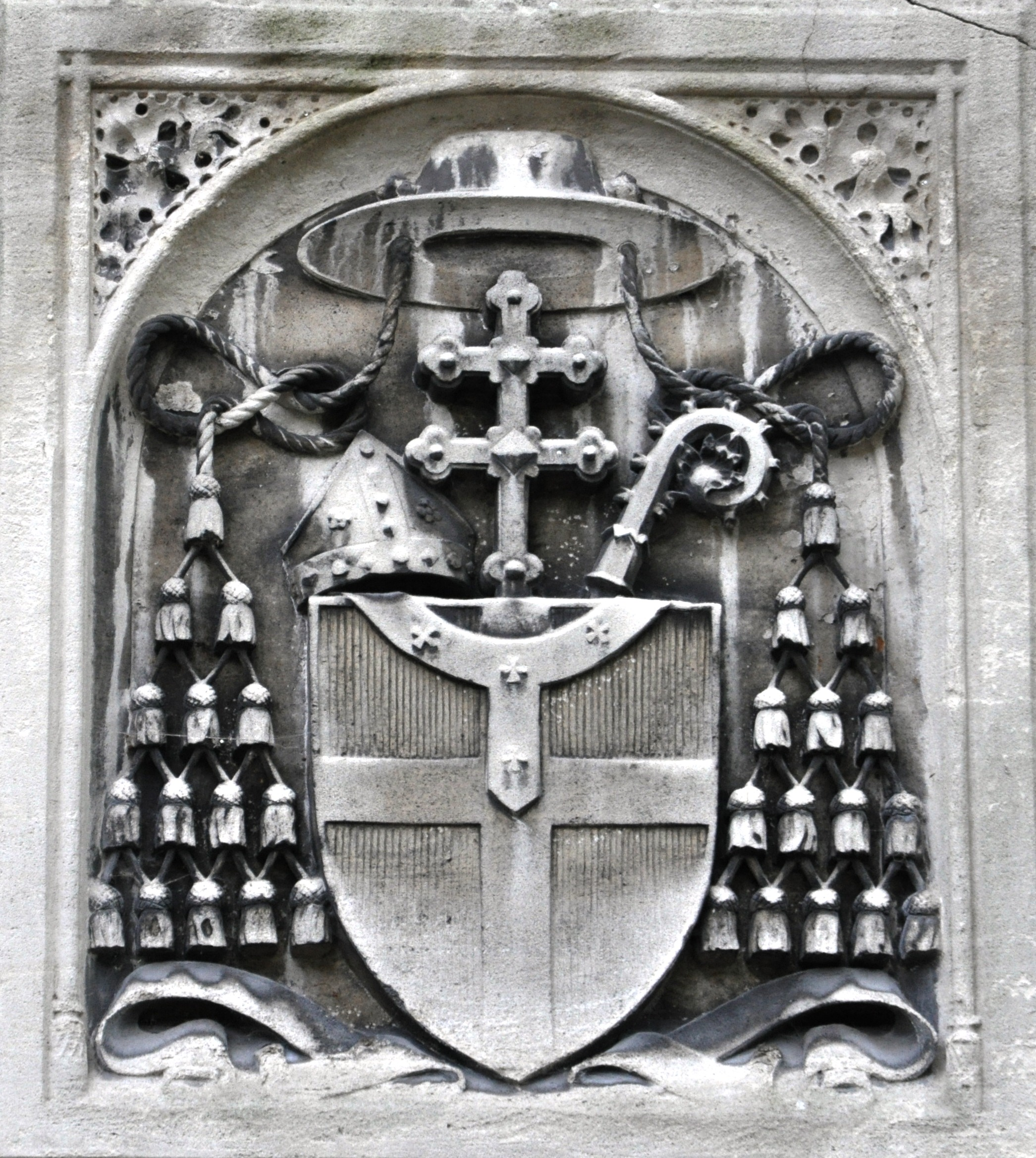 Wapen van Andreas Ignatius Schaepman boven de crypte op de Begraafplaats Sint Barbara in Utrecht.